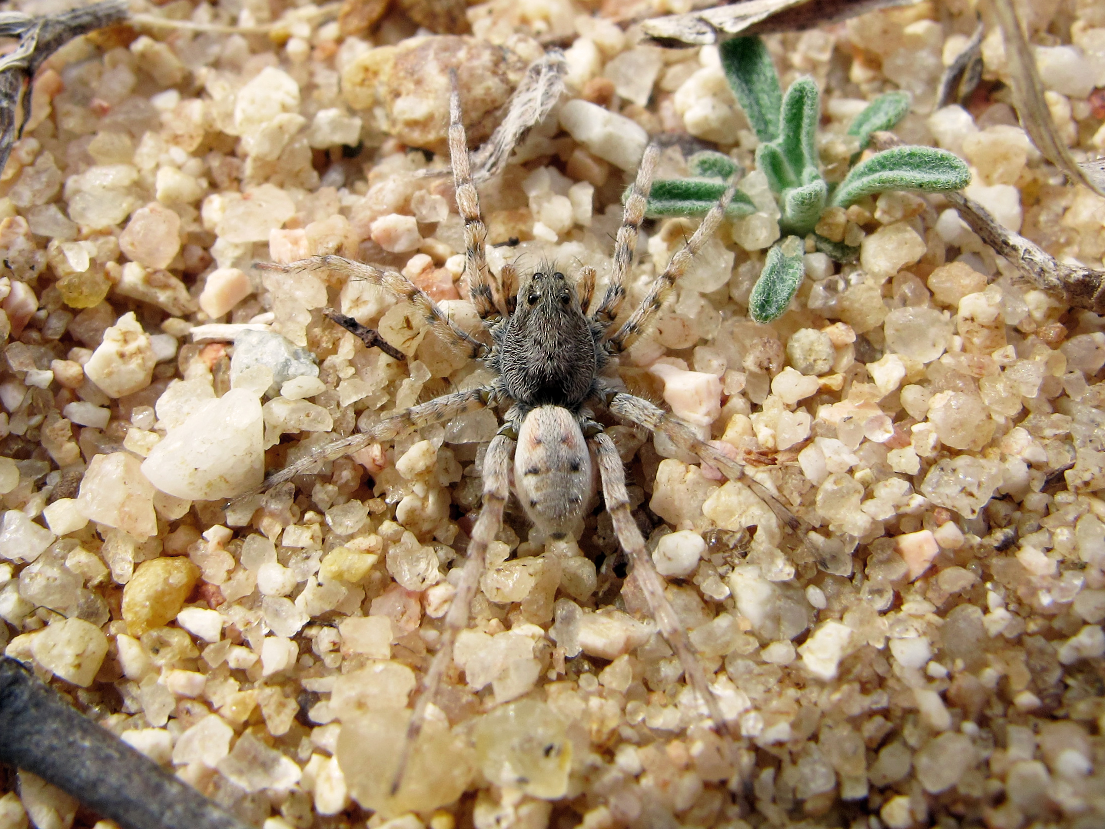 Especie fuertemente asociadas con la de arena esta la encontre en el márgen de río. sera una araña grande y es bastante abundante que nunca se aleja de la orilla del agua. Si se siente amenazada, incluso puede llegar a sumergirse.